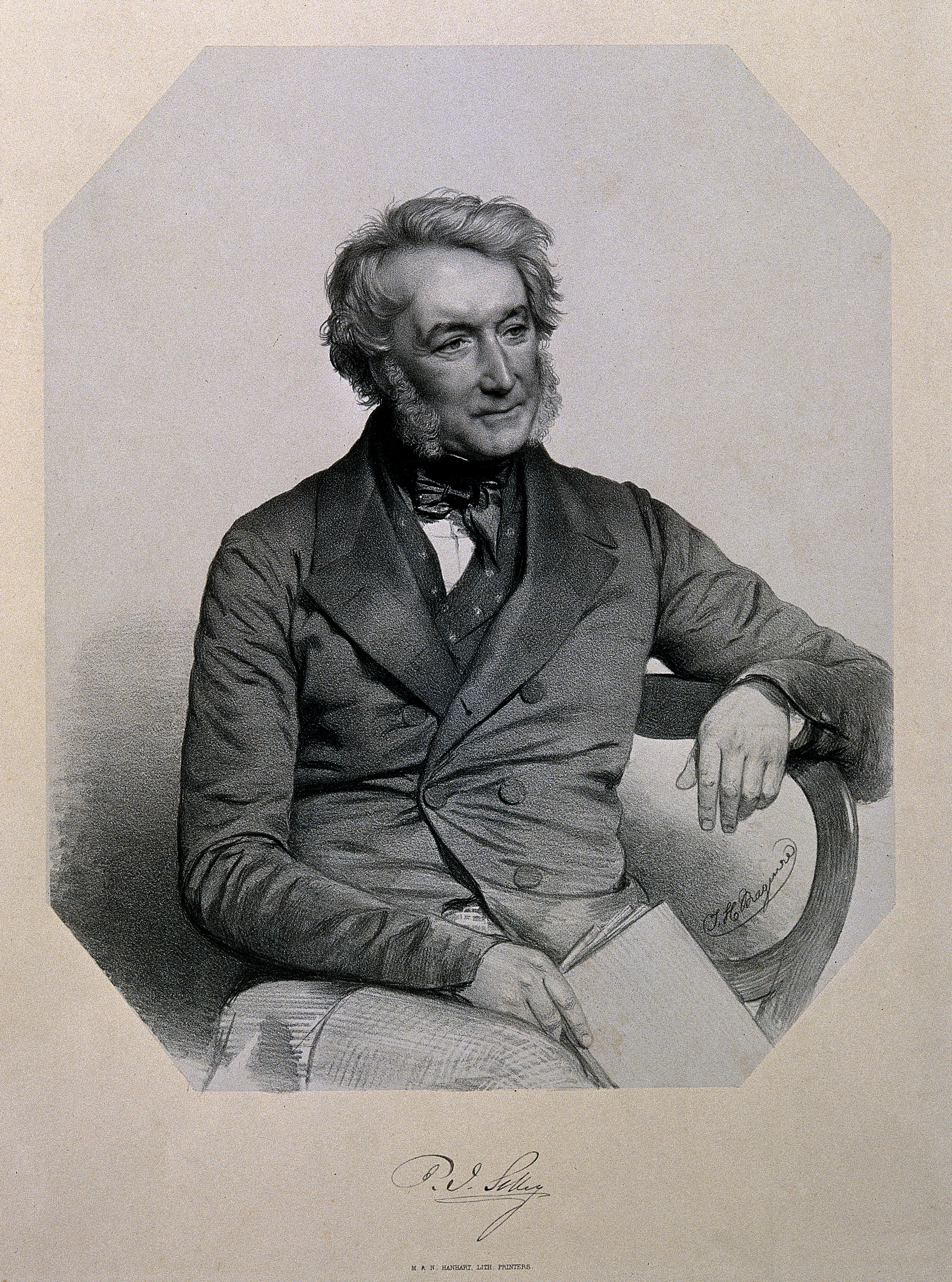 Genre/Technique: Portrait prints. Lithographs. Subject name: Selby, Prideaux John, 1788-1867.